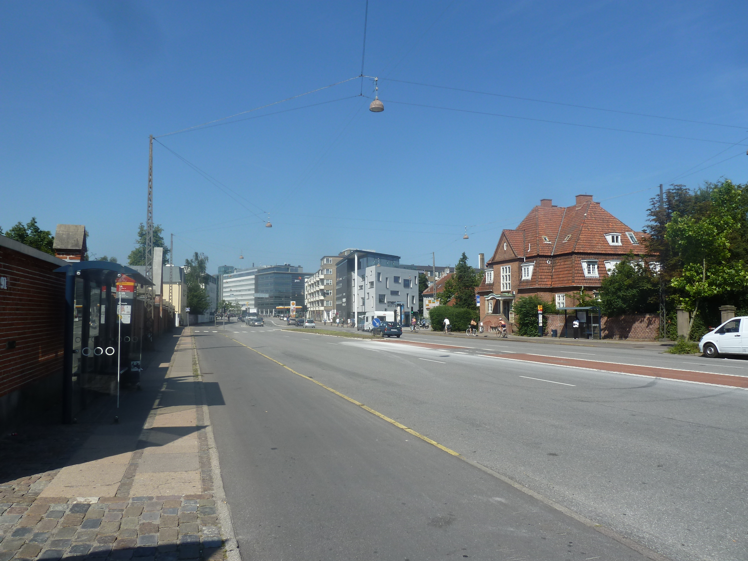 The street Strandvejen in Østerbro in Copenhagen.